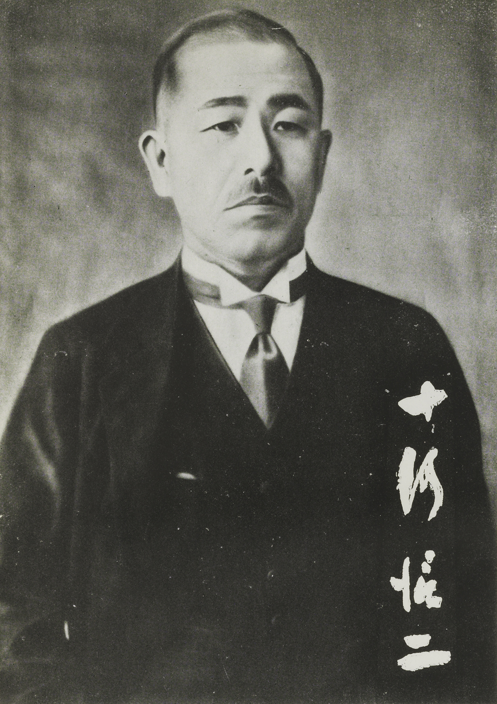 Portrait of Sogo Shinji (十河信二, 1884 – 1981)